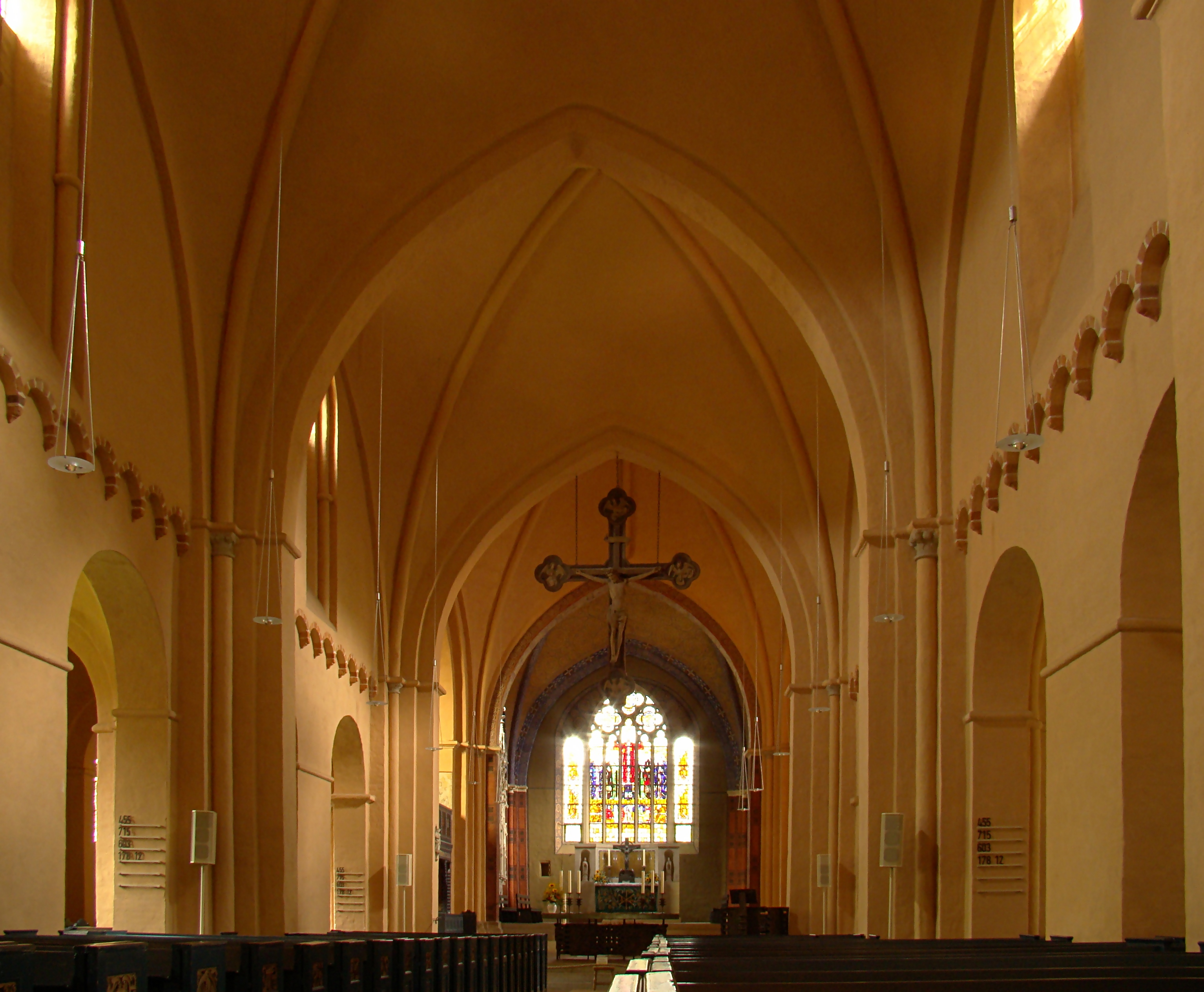 Wildeshausen, Alexanderkirche Wildeshausen, Alexander church